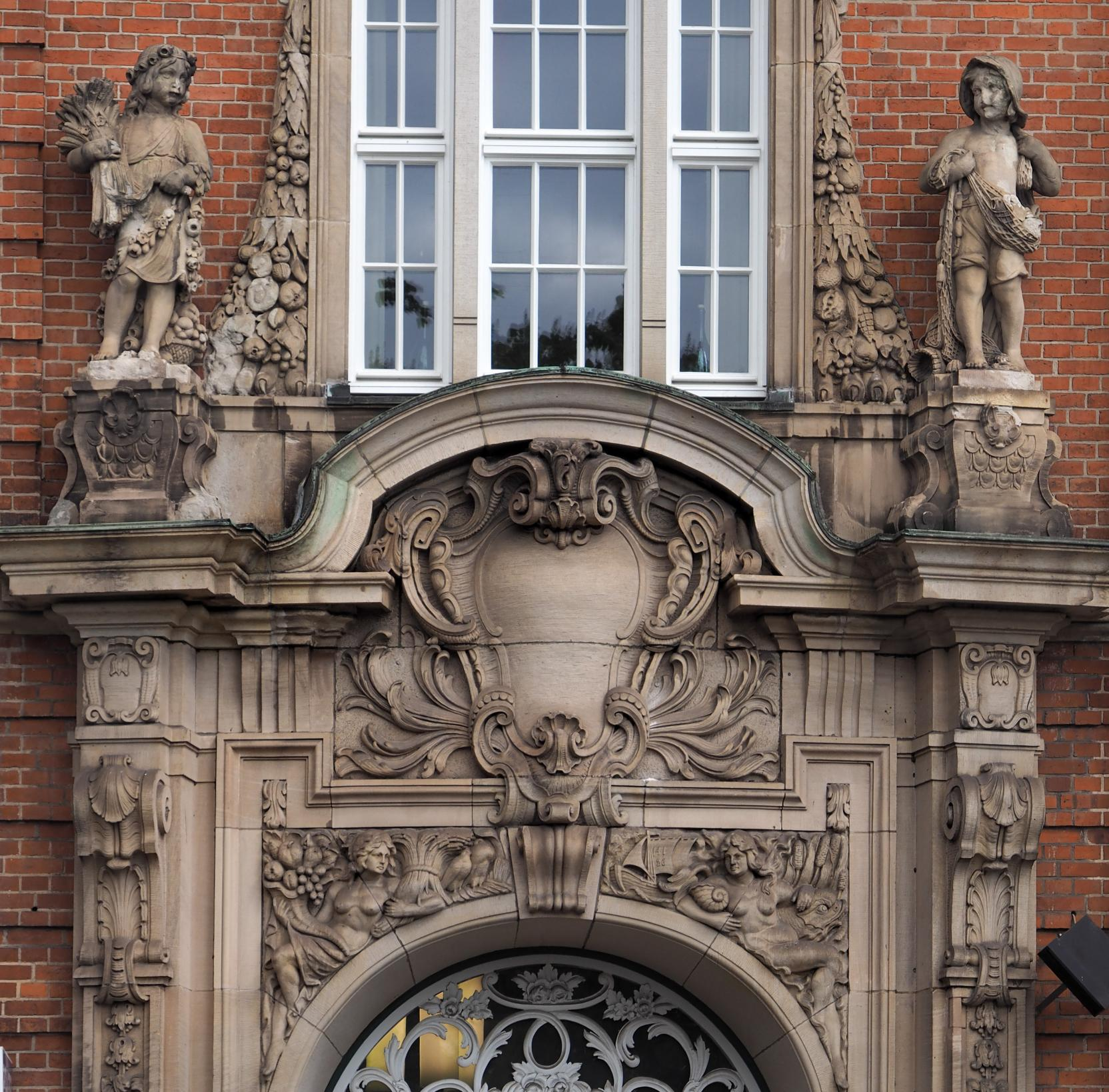 Hamburg-Altstadt, ehem. Haus der Landherrenschaften, Klingberg 1, Eingang, Foto: 2016